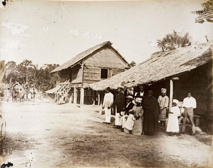 Foto. Gaaman (Graman) Noah Adrai Vroomhart was van de Matawai. Hij regeerde van 1870-1893. In december 2008 hebben de Matawai die in Tilburg wonen, een replica van een stoel die door Graman Vroomhart aan het Museum voor Volkenkunde in Herrnhut was geschonken, teruggebracht naar Suriname. . Granman Adrai Vroomhart in zijn dorp